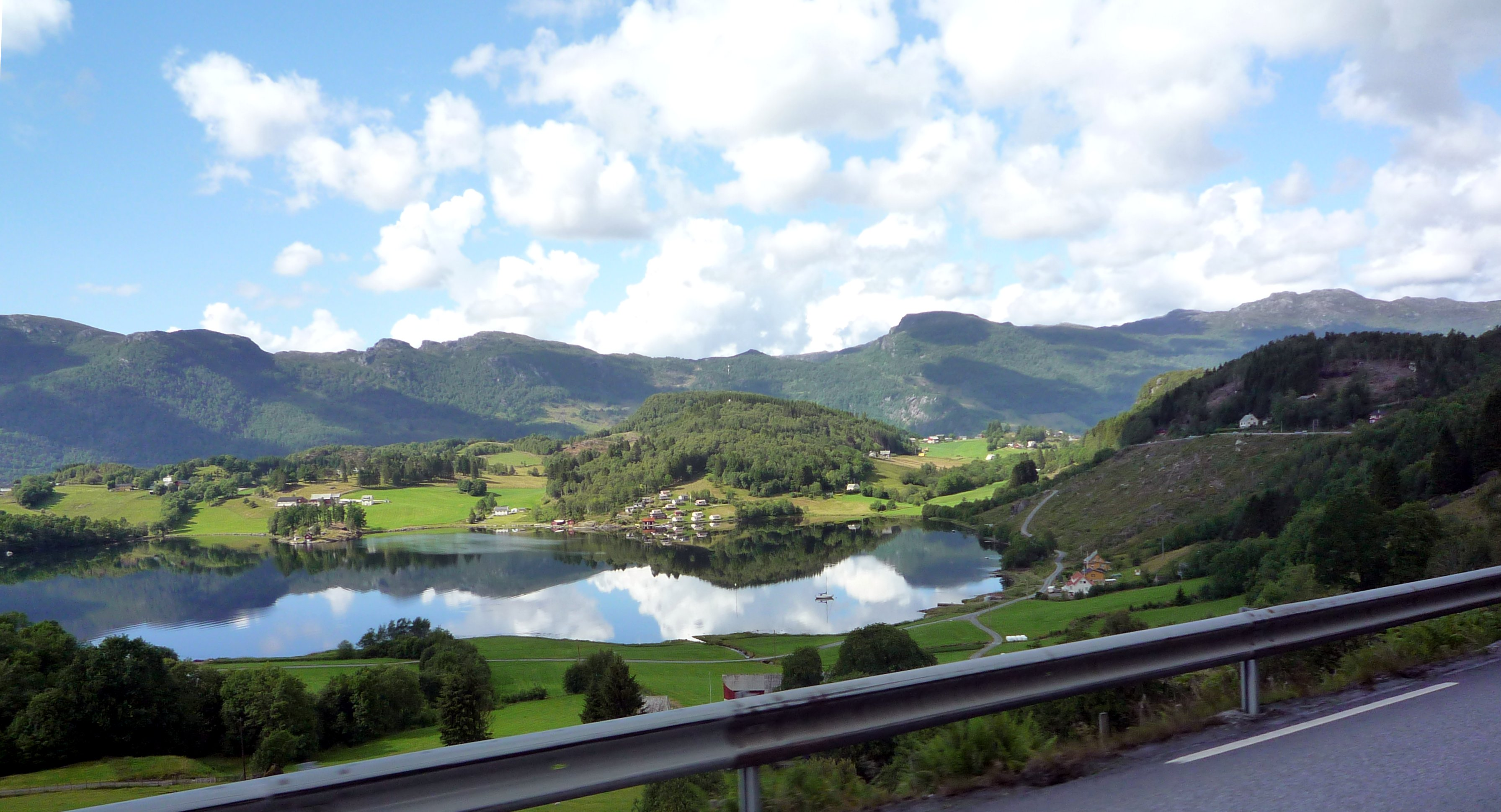 Osvågen, Etnefjorden. Vegen er Europaveg 134